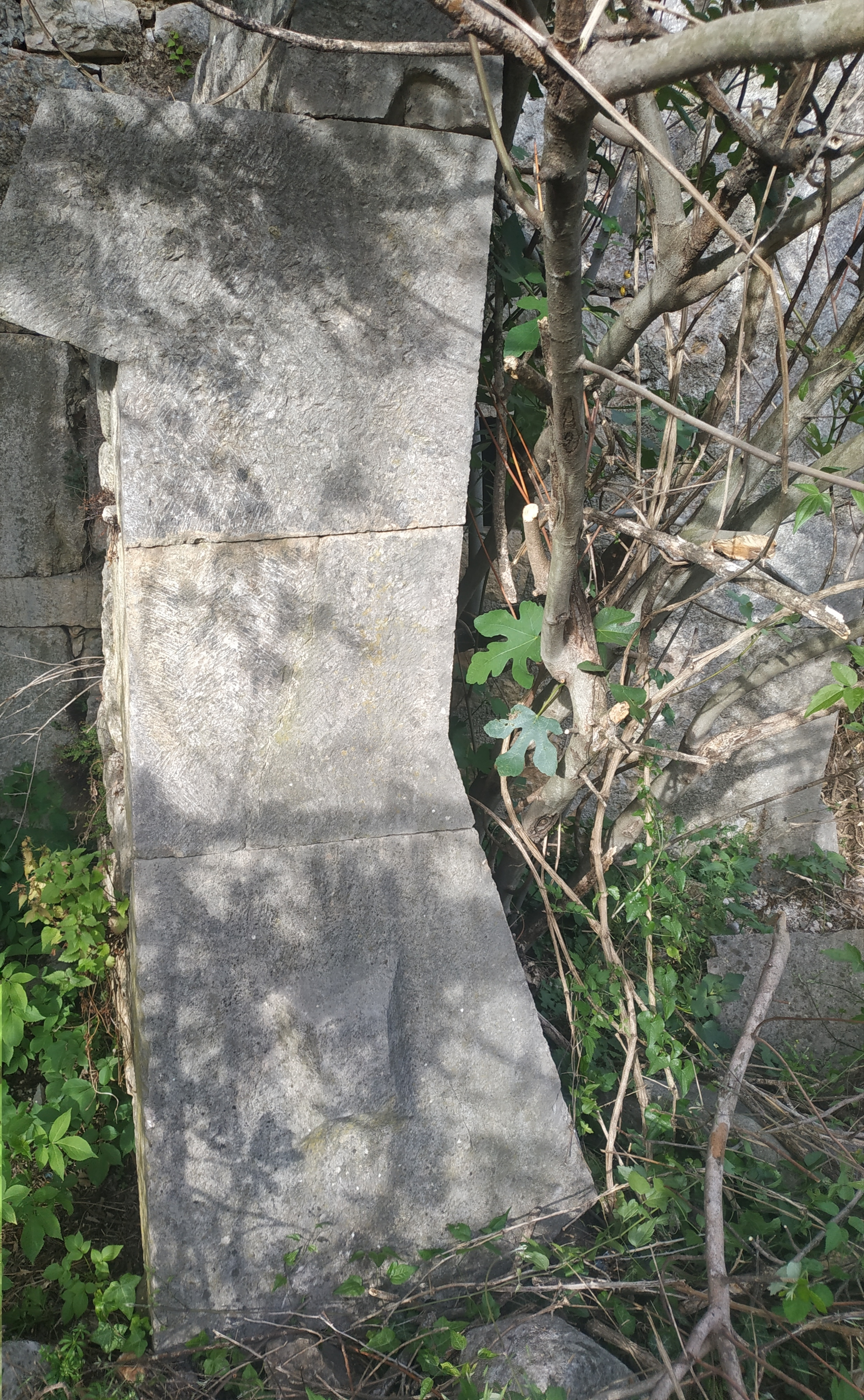 Kamenje s ruševina municipija Magnuma korišteno za gradnju kuća